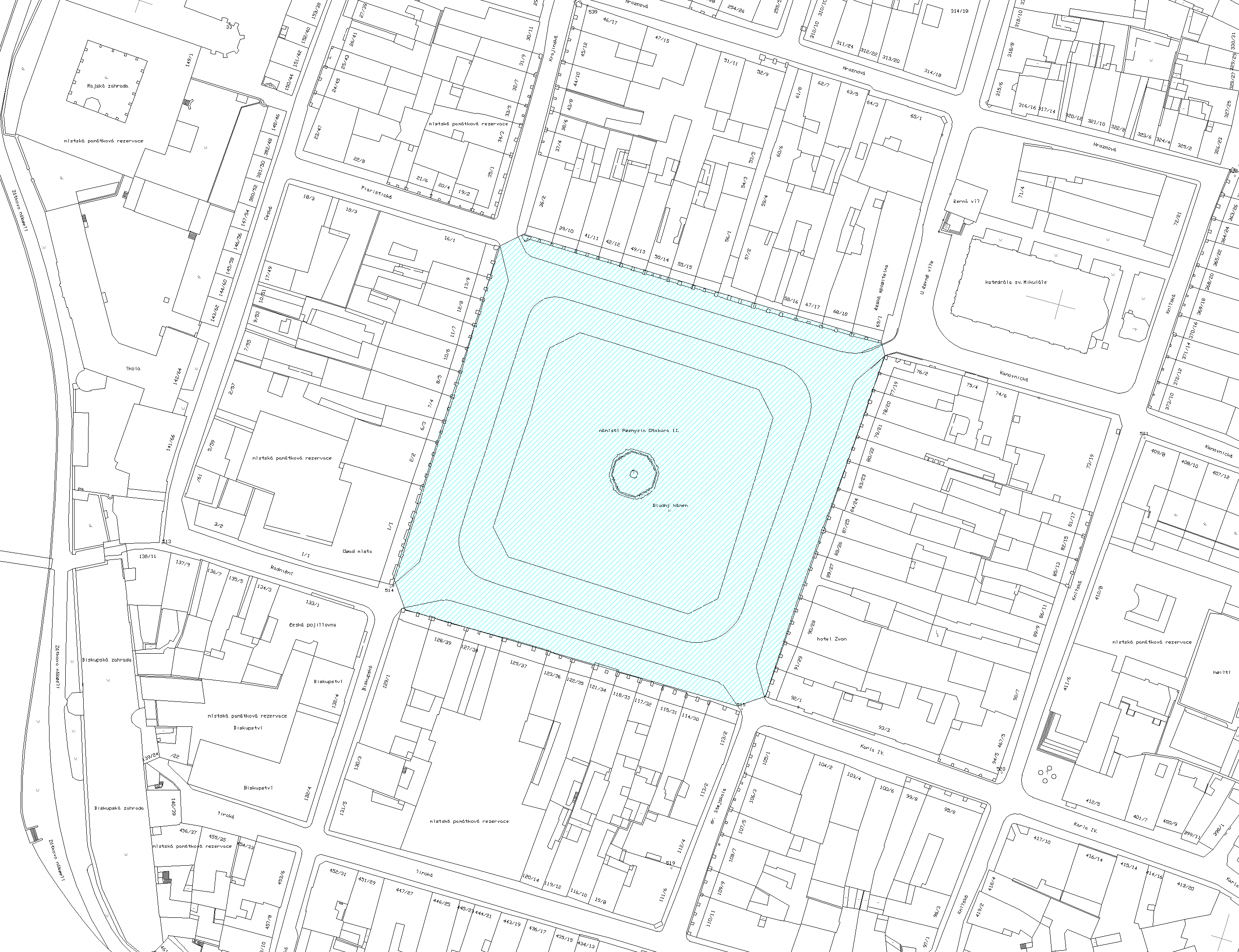 Náměstí Přemysla Otakara II. v Českých Budějovicích, zákres do katastrální mapy